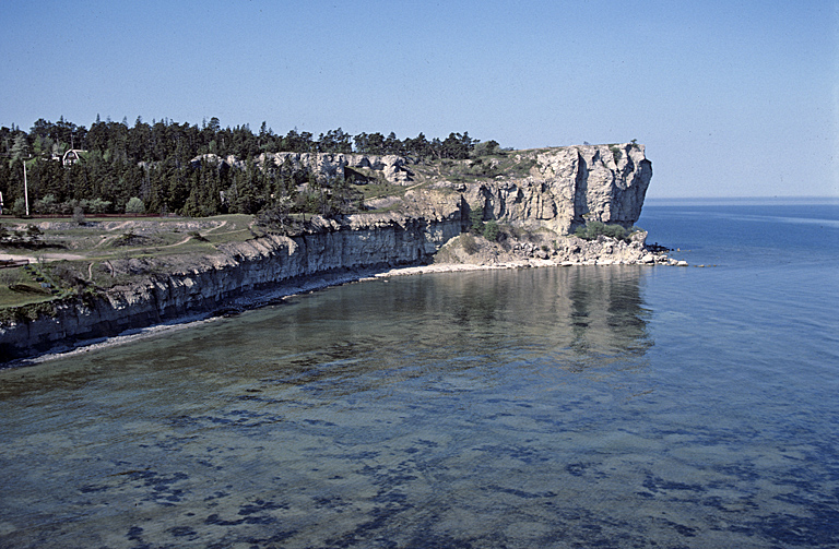 Bilden troligen från 1980-talets början. Motiv: Högklint Nyckelord: Flygbilder, Naturreservat, Riksintressen Kategori: Kust- och skärgårdsmiljö Bilden troligen från 1980-talets början.